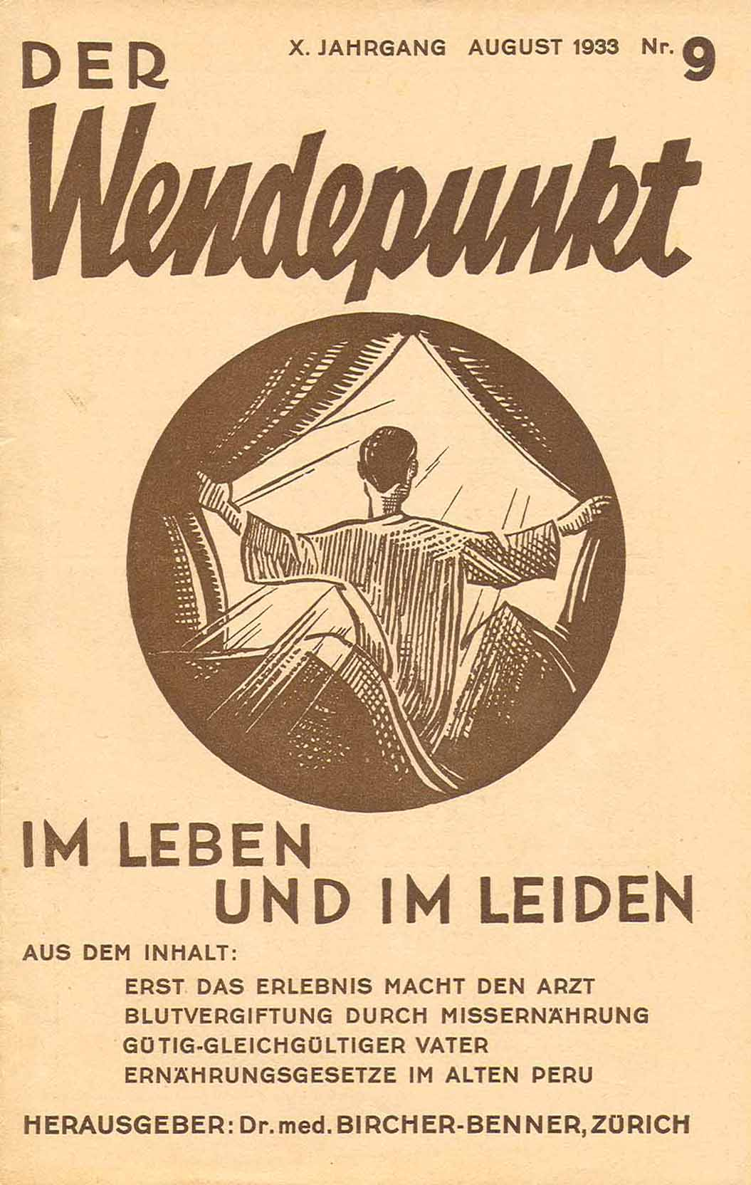 Titelblatt der Bircher-Benner-Monatszeitschrift "Der Wendepunkt im Leben und Leiden" aus dem Jahre 1933